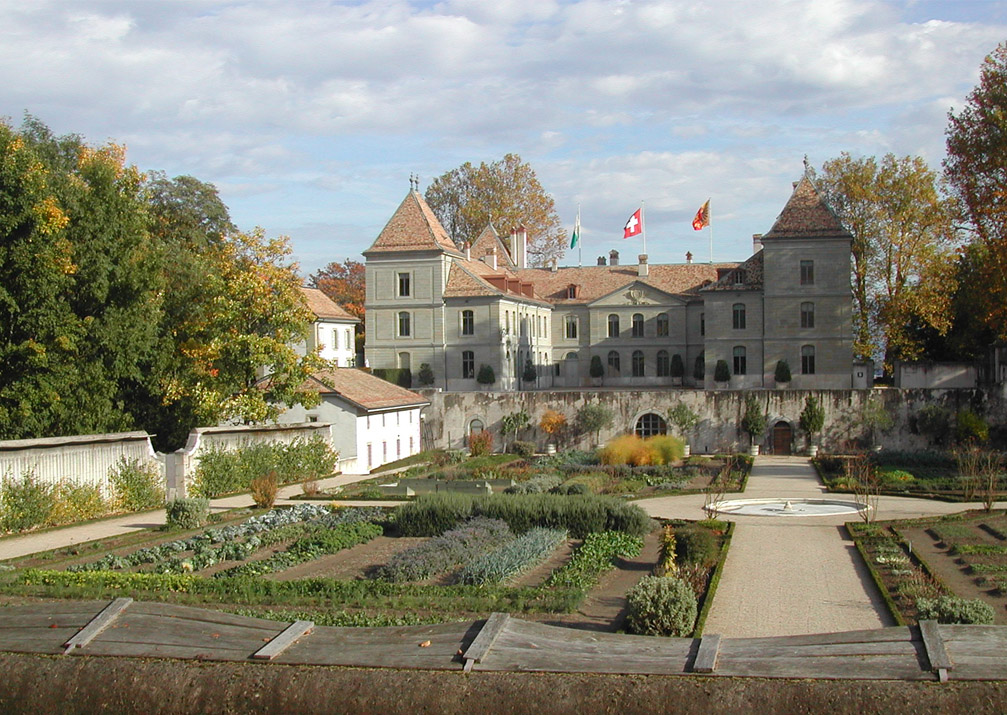 Vue du château de Prangins prise par l'utilisateur en octobre 2005.